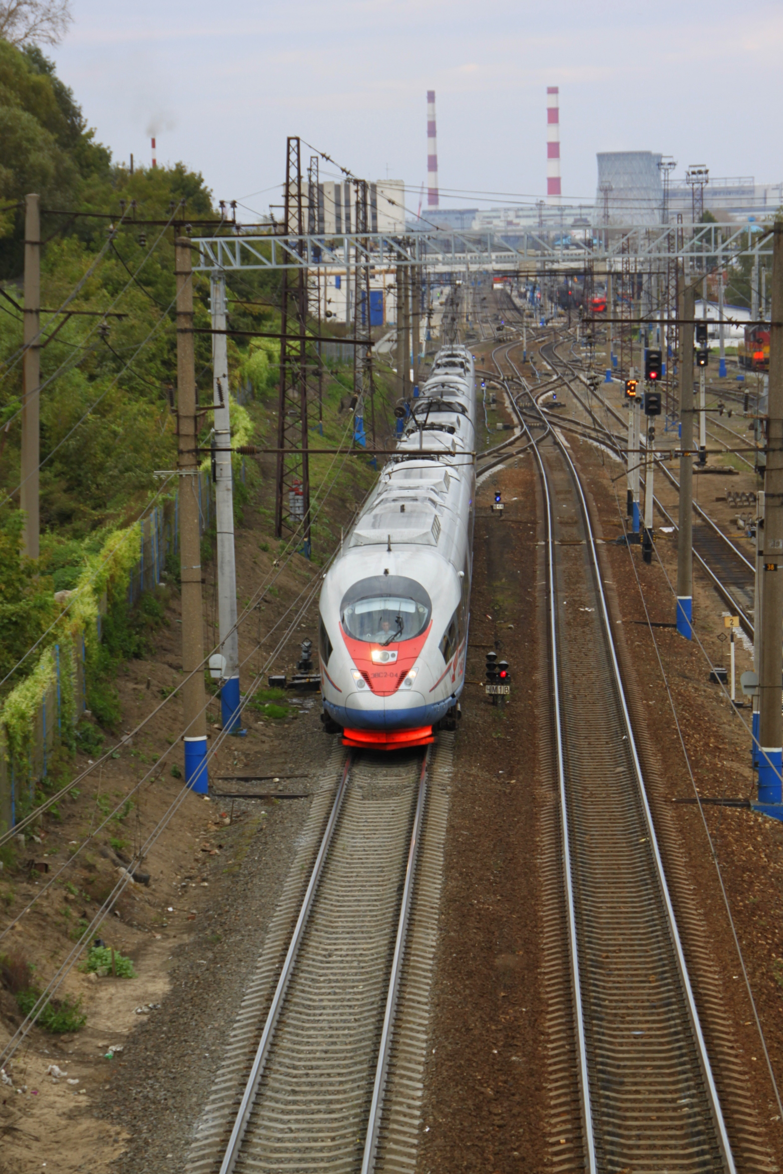 Сапсан "Нижний Новгород - Москва"